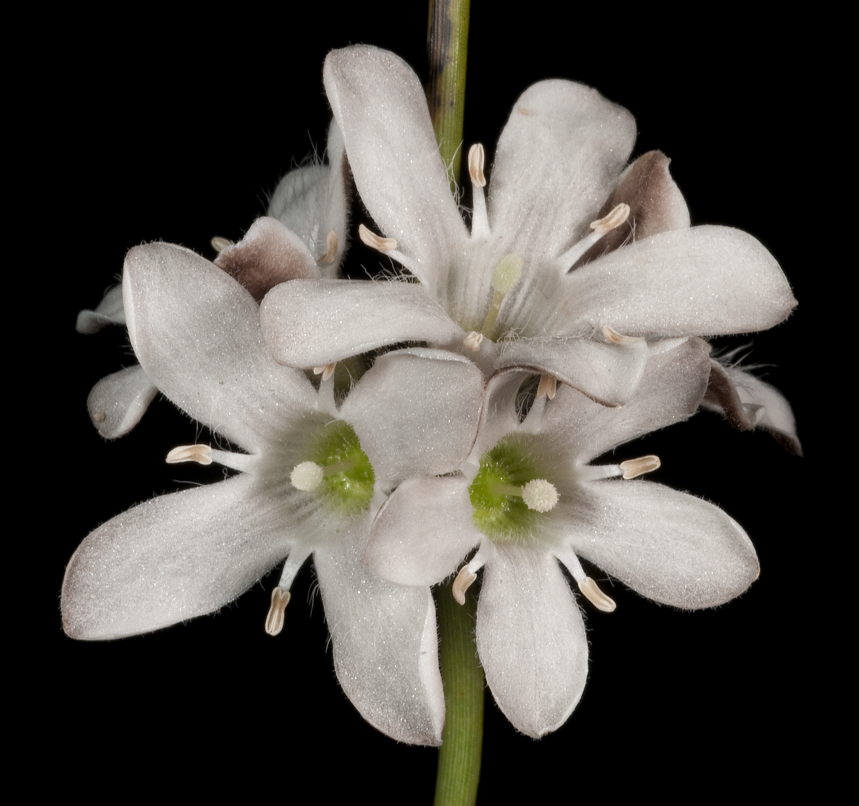 KRT4326